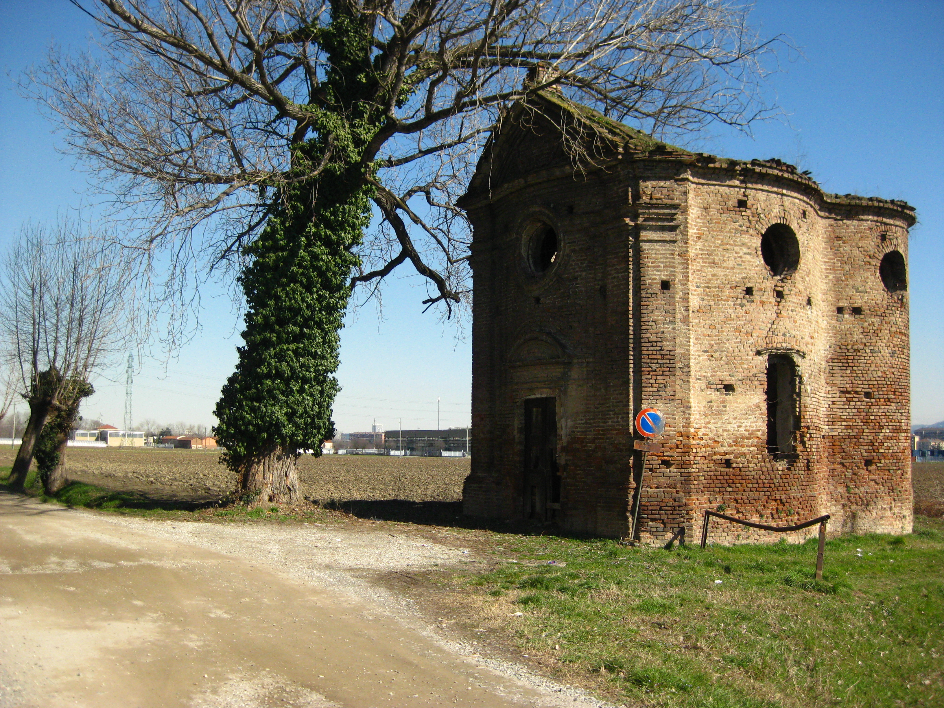 Scorcio dei campi gerbidesi e della cappella Mandina